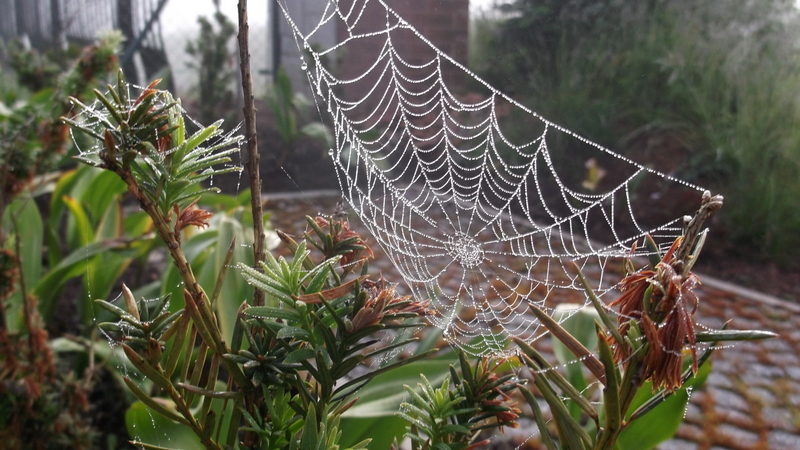 Poranna rosa na pajęczynie